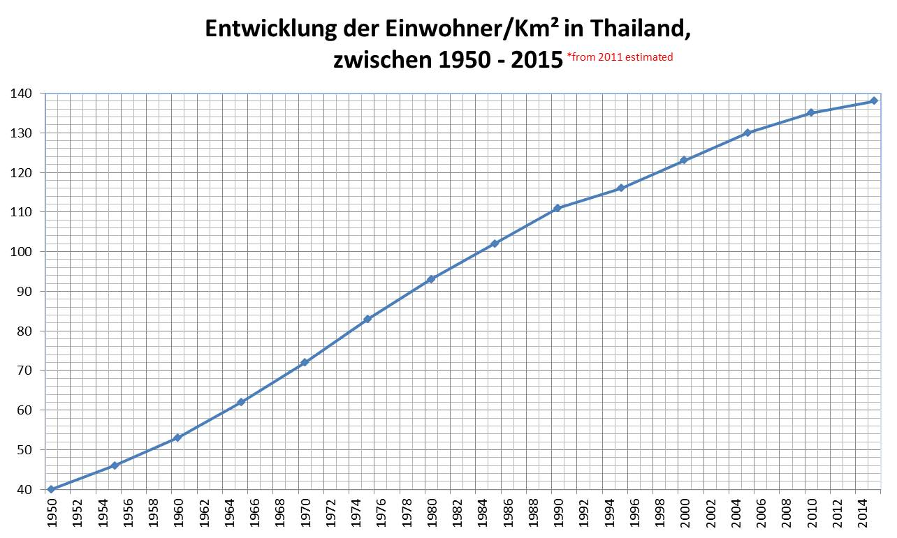 Einwohnerentwicklung in Thailand, Einwohner/km²